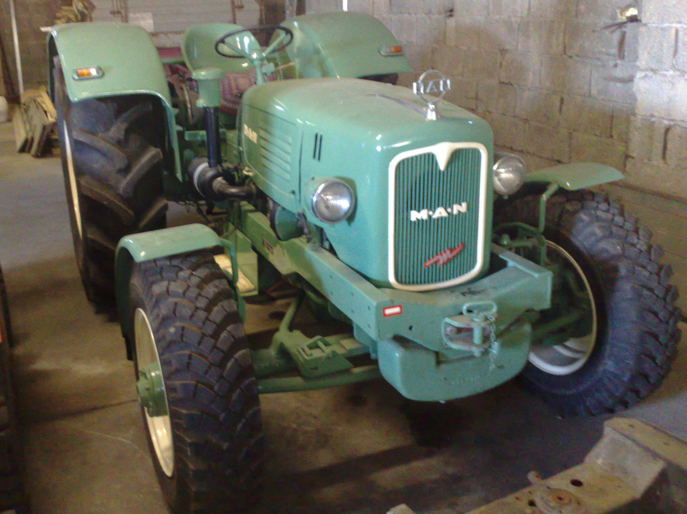 MAN 4S3 Prototyp, Baujahr 1963